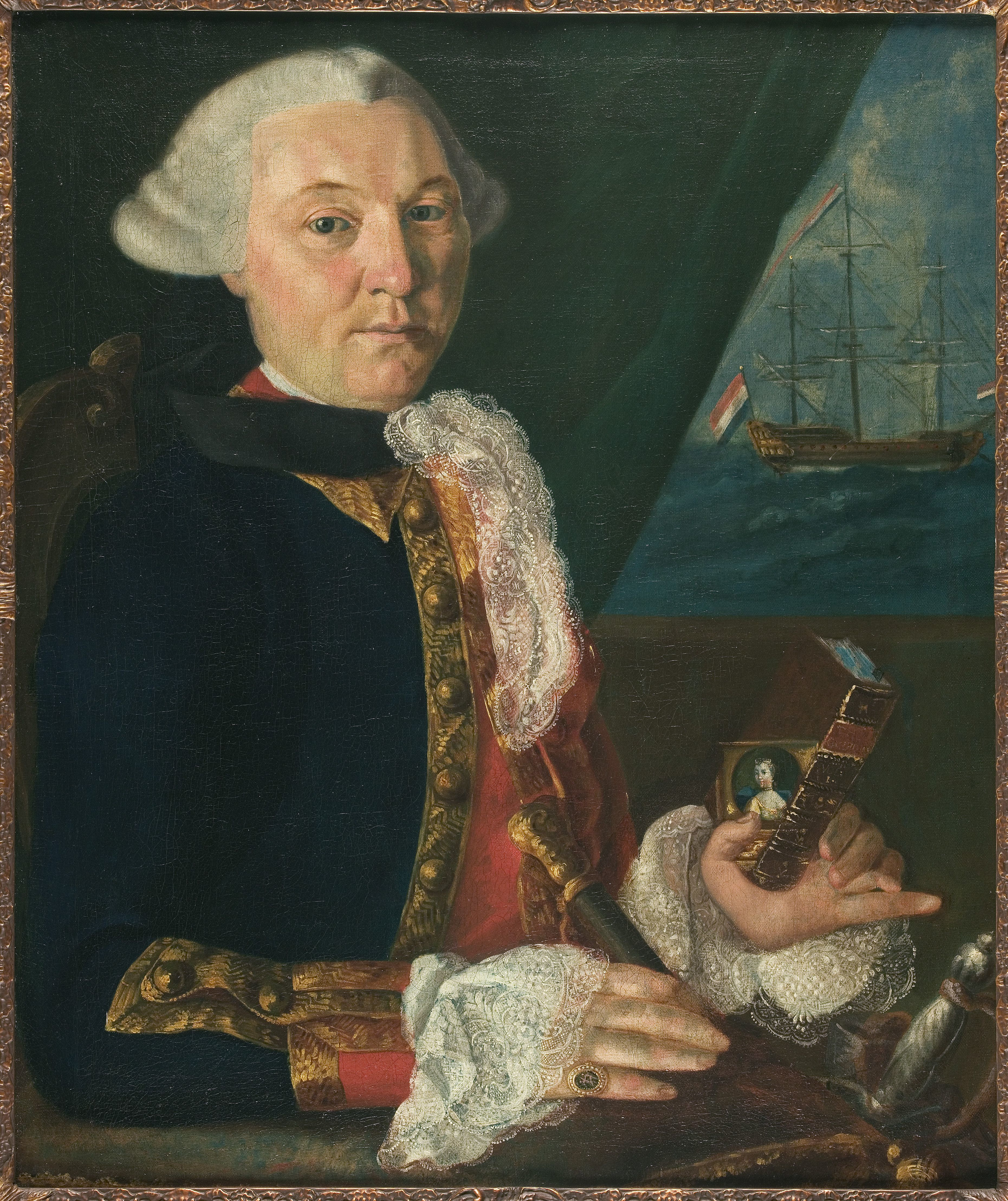 Portret van Jacobus Deketh